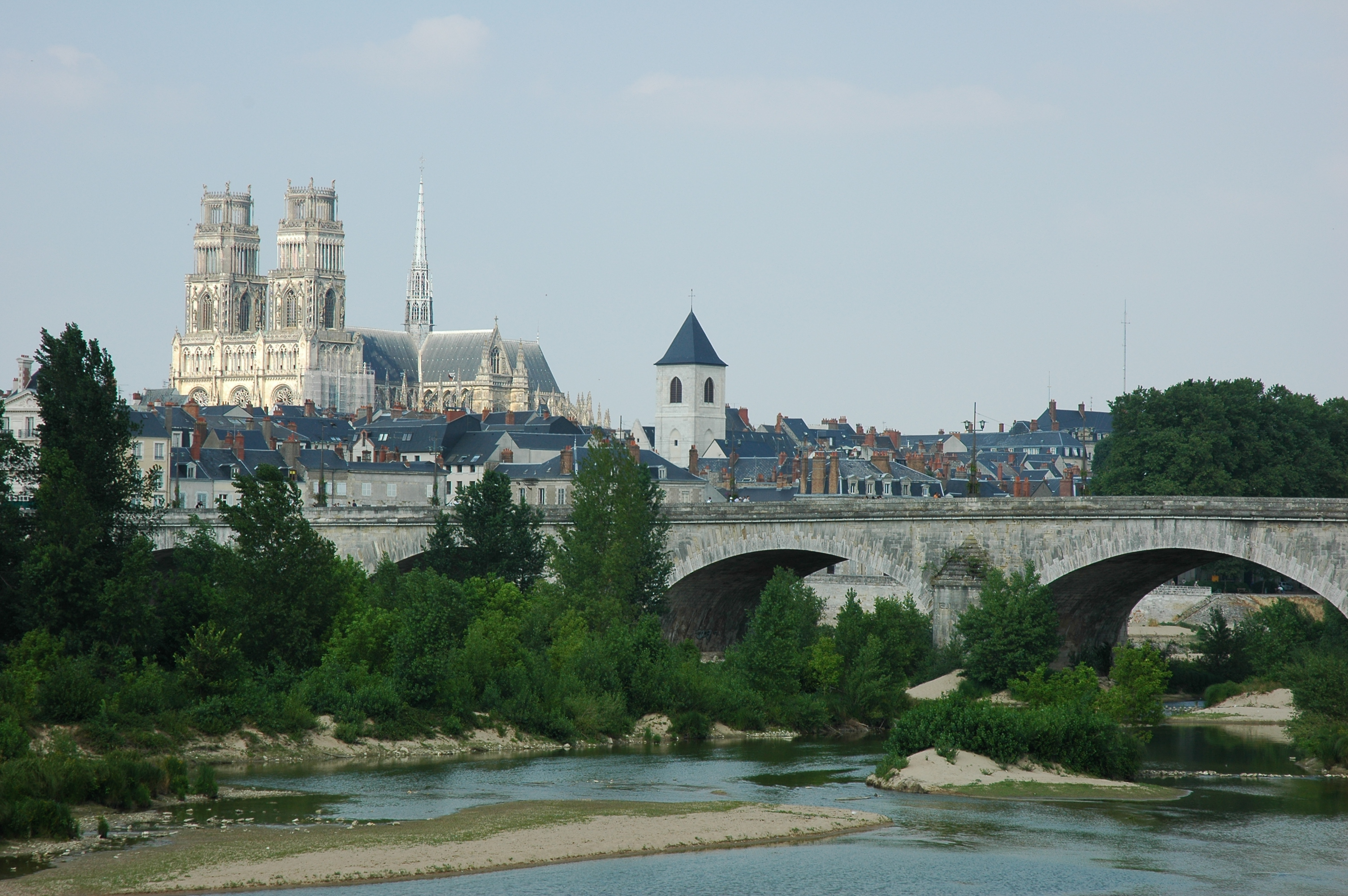 France Loiret Orléans Cathédrale Sainte-Croix Photographie prise par GIRAUD Patrick